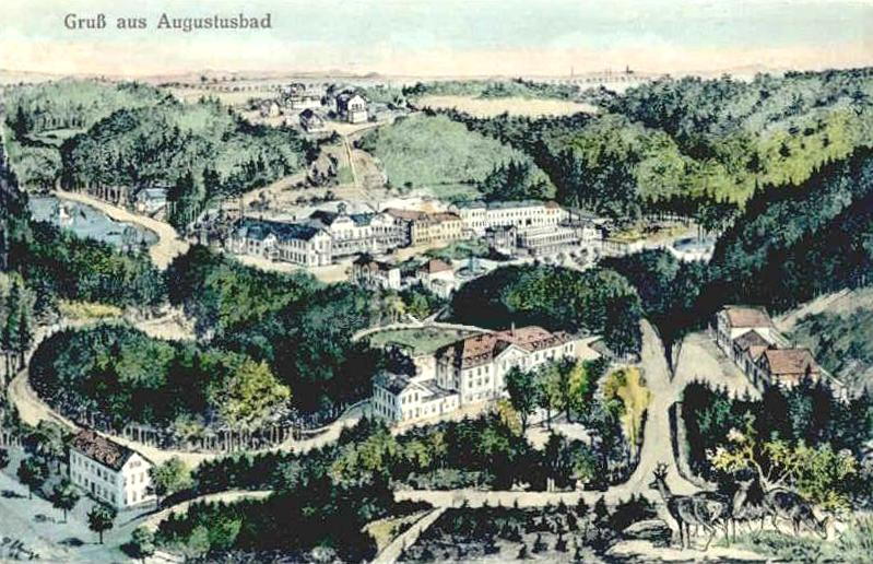 Postkarte mit Blick auf das Augustusbad bei Radeberg (Karte ist 1912 gelaufen)